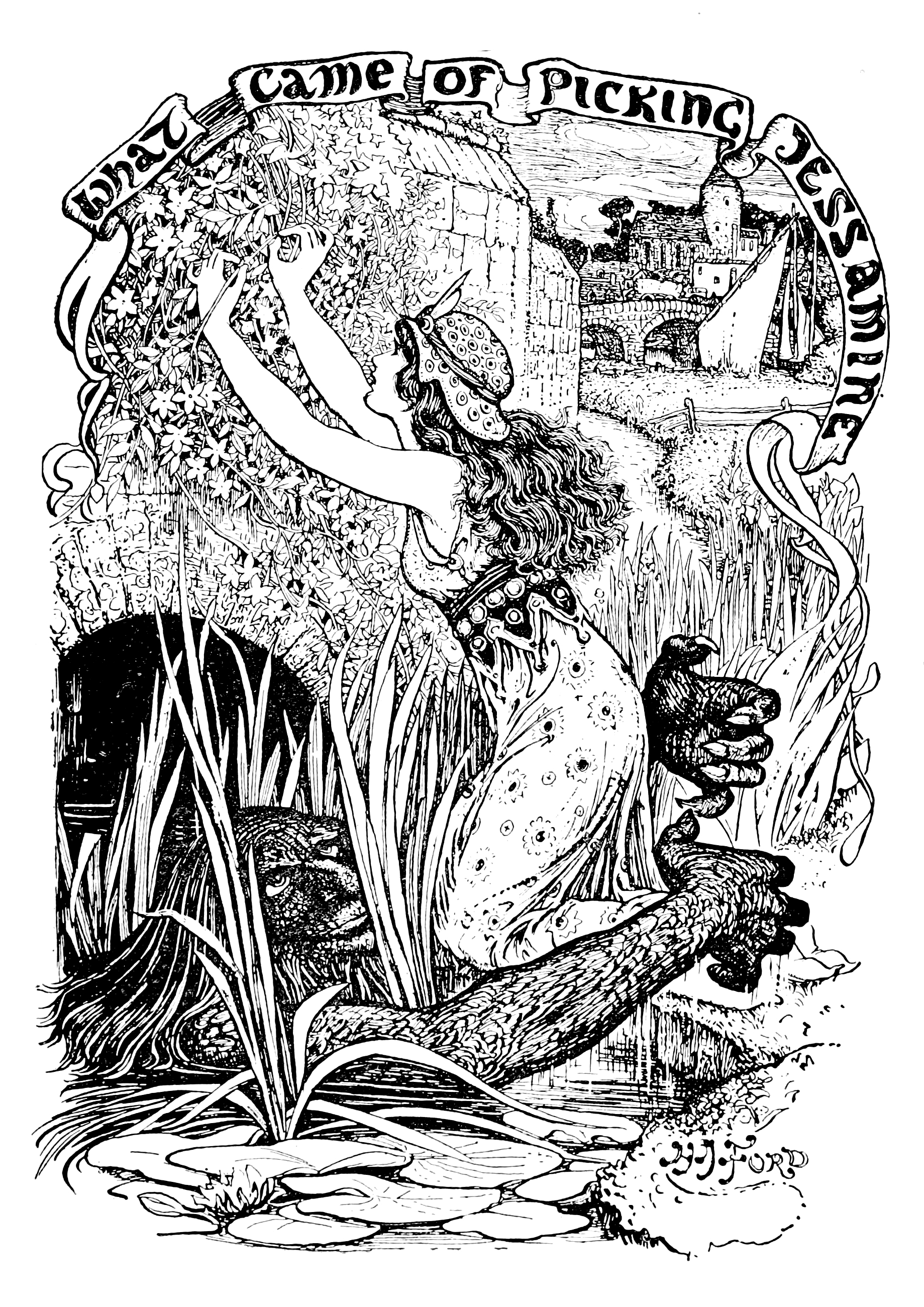 Ilustração de H. J. Ford ao conto português "O que veio de colher flores" para o The Grey Fairy Book de Andrew Lang.